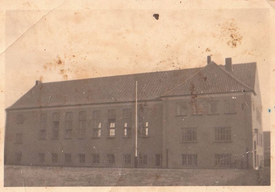 Altes Foto der Turnhalle von Groß Berkel. Damals noch "Haus der deutschen Jugend" genannt.